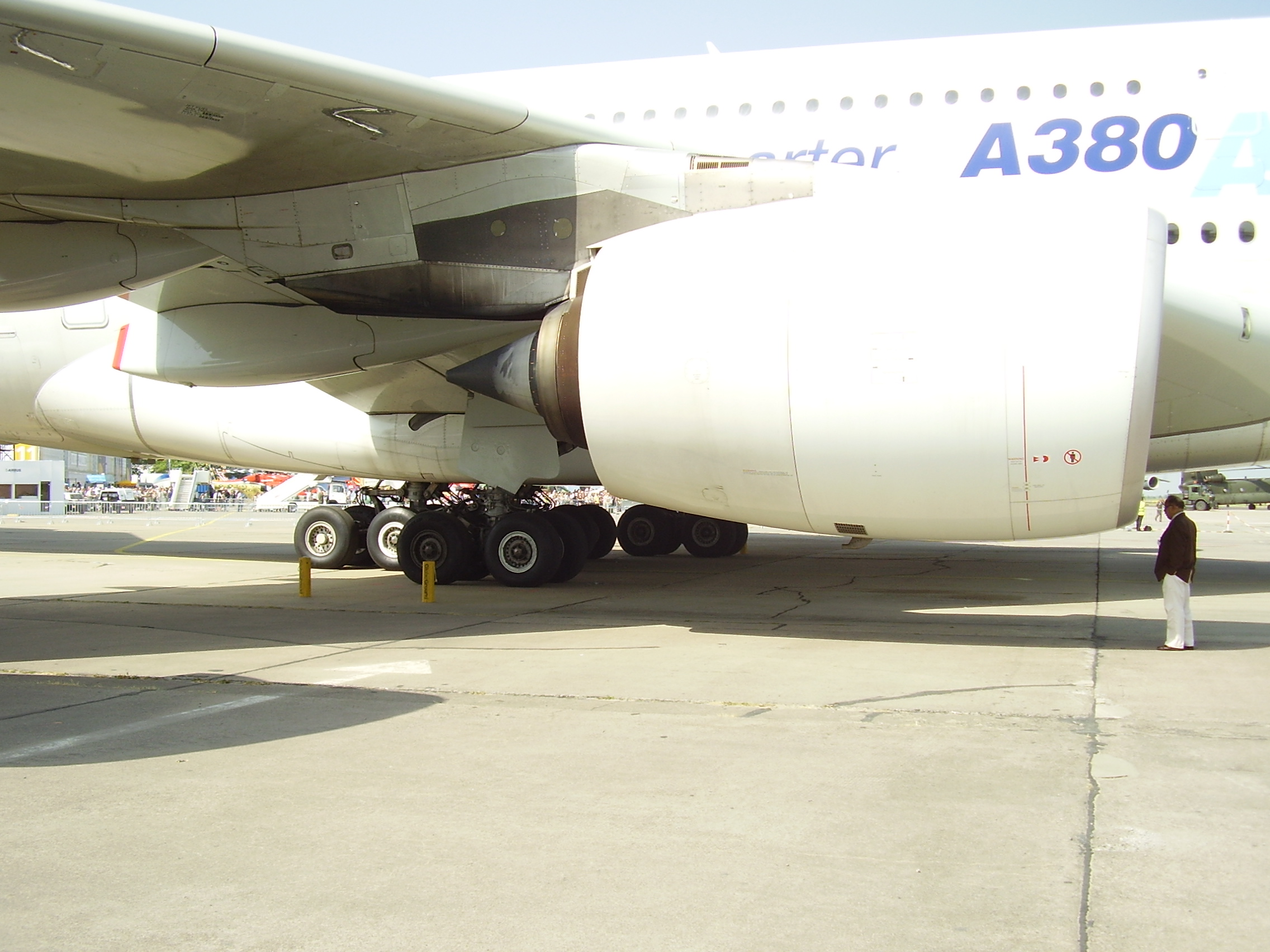 ILA 2008